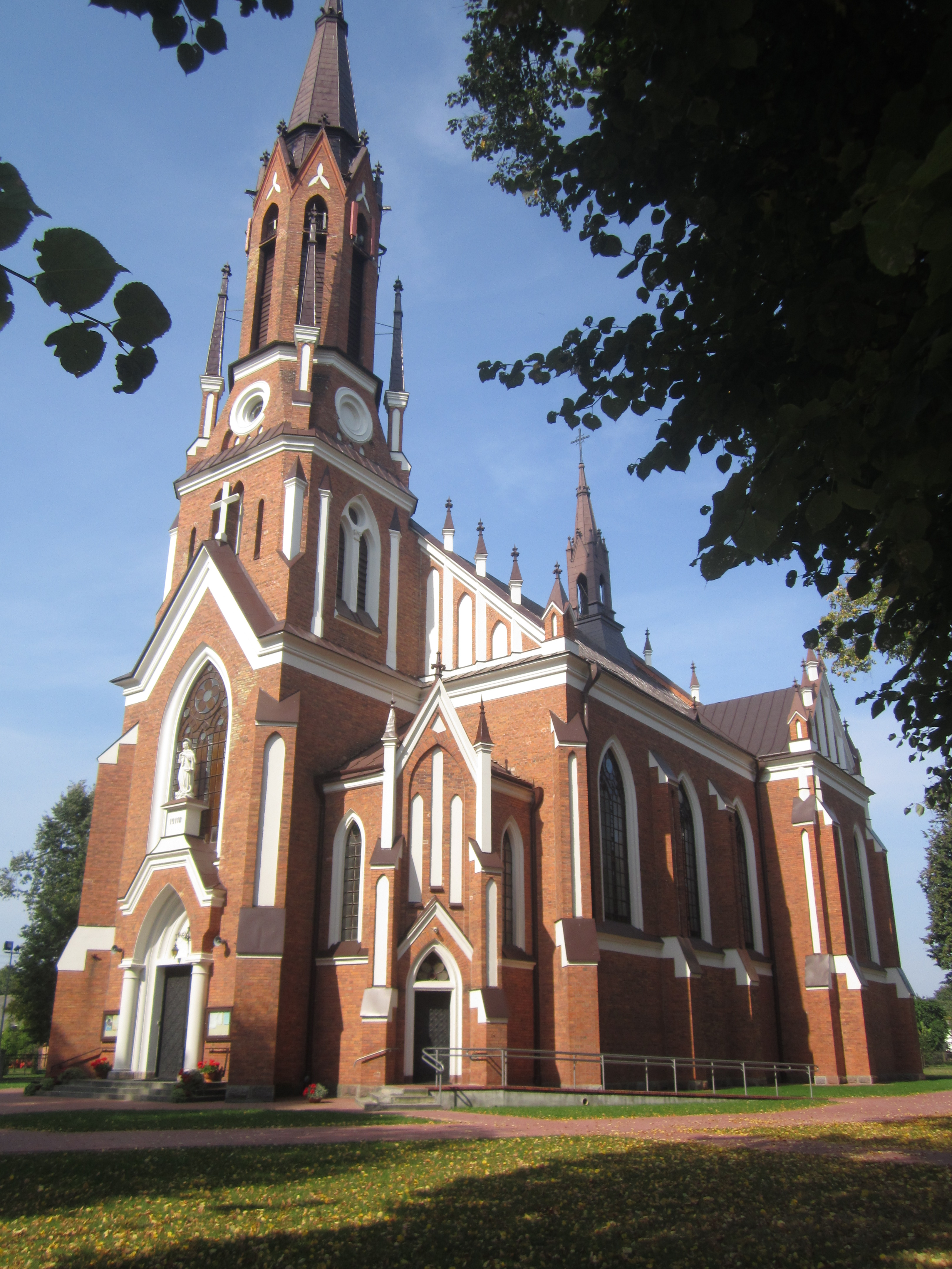 Łomazy, kościół par. p.w. śś. Apostołów Piotra i Pawła, 1907